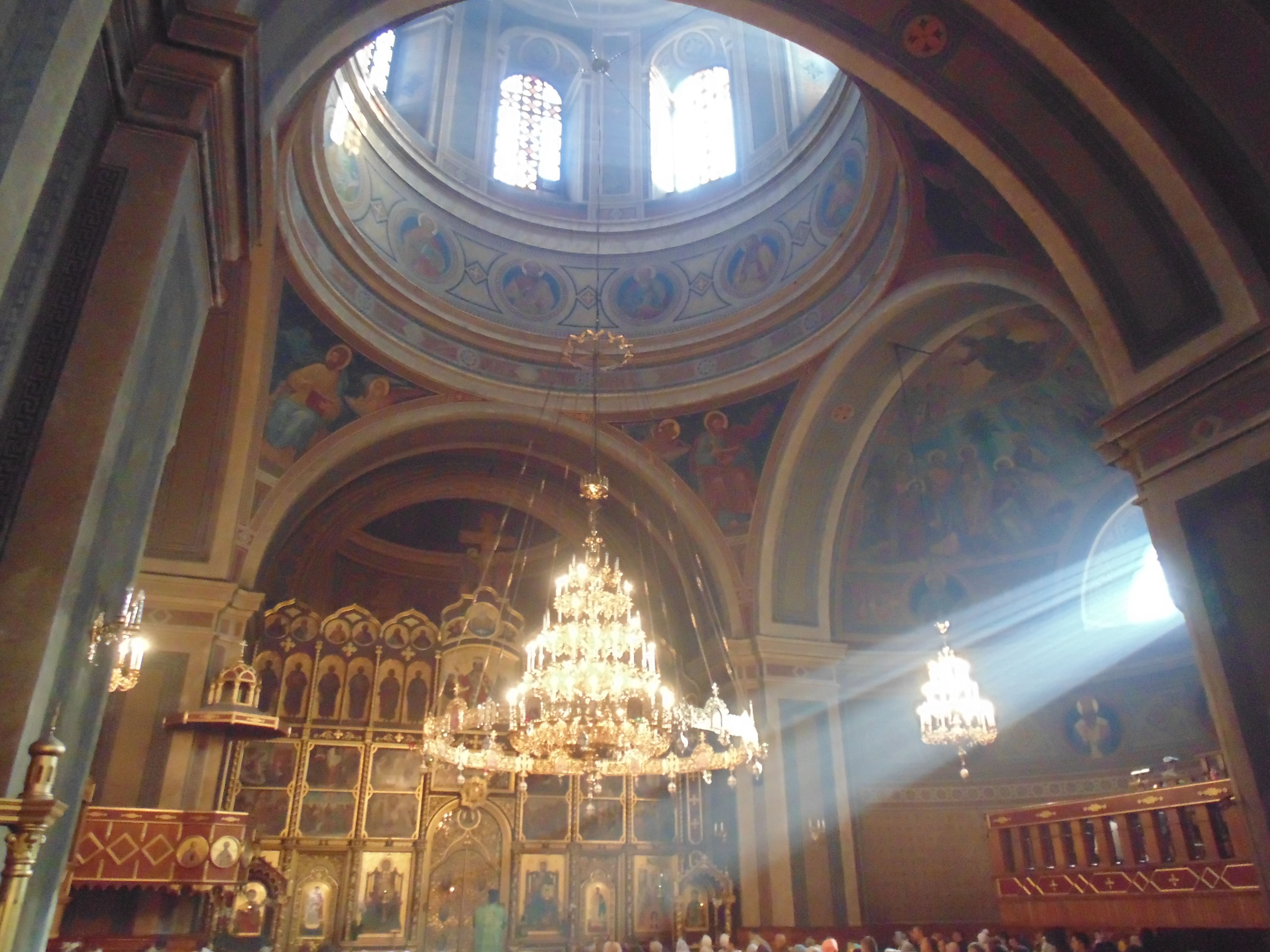 Кафедральний собор "Святого Духа" (арх. Рьолль, Й. Главка, інж. Марін), Чернівці, Головна, 85